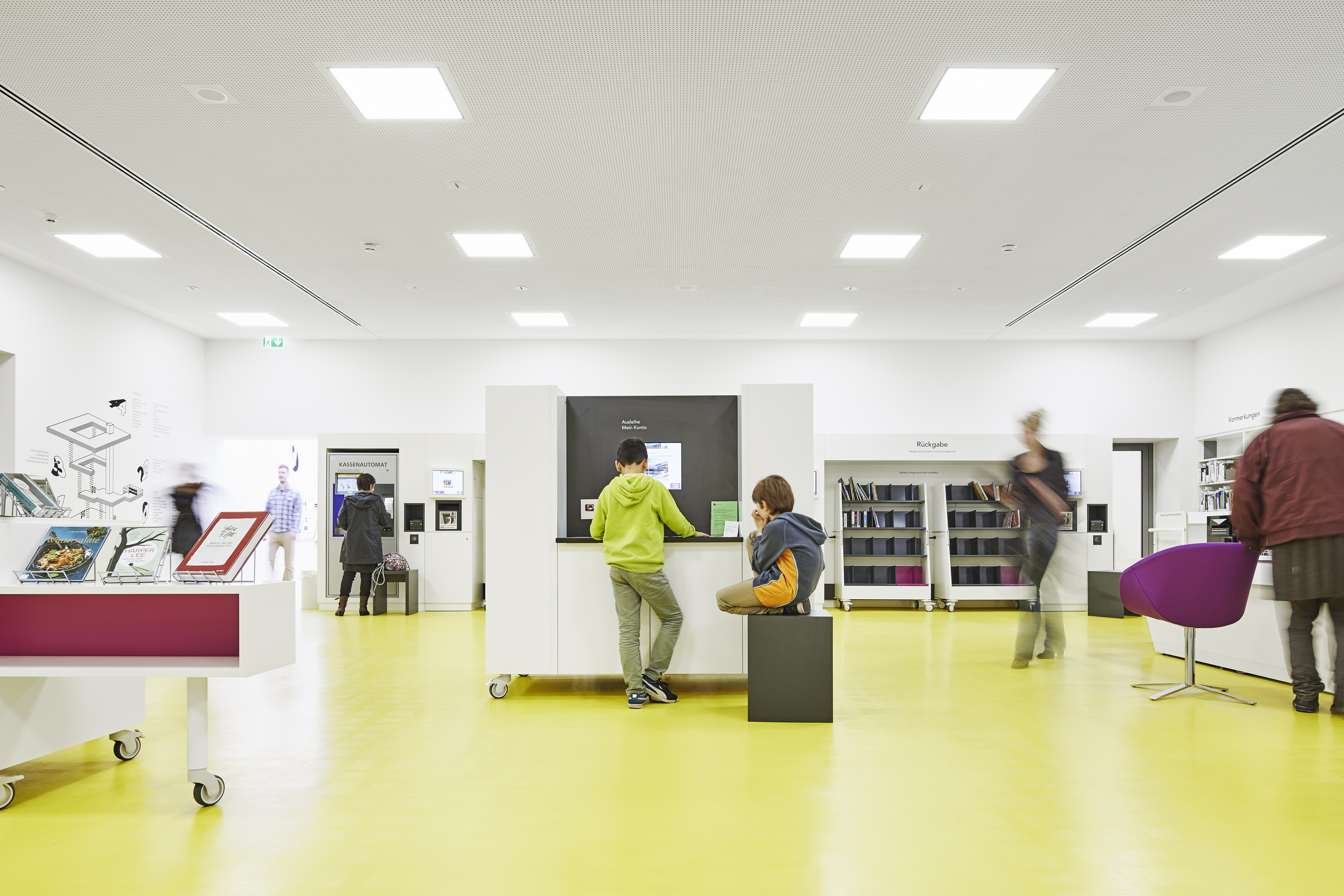 Eingangsbereich der Stadtbibliothek Ludwigsburg.